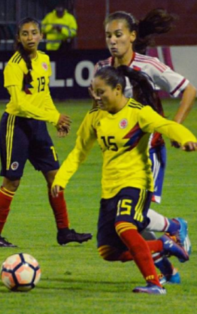 Nicol en el Sudamericano Sub 20 Femenino 2018